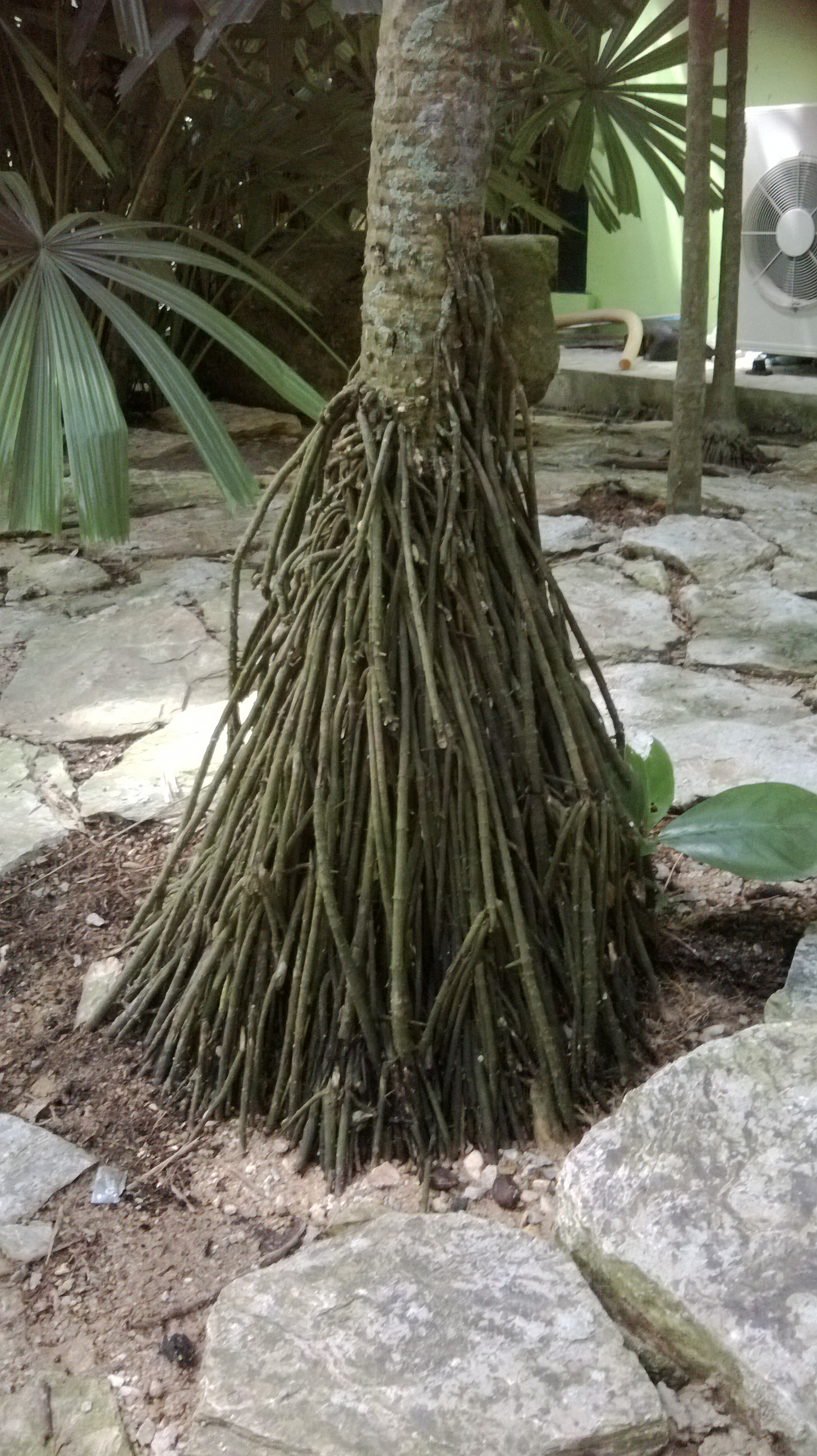 Cryosophila williamsii (Root-spine Palm). Nong Nooch Tropical Garden. Thailand.